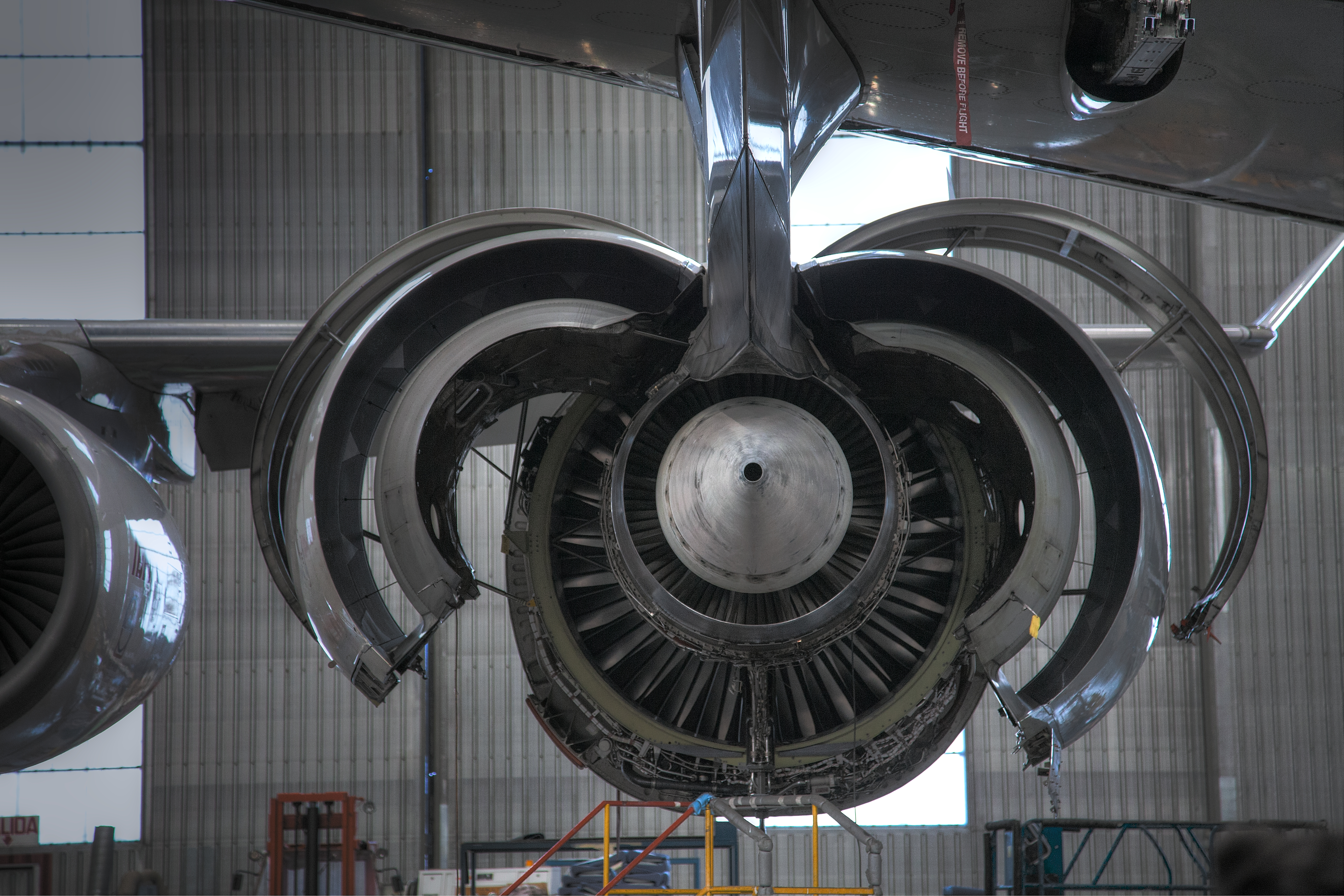 Iberia, La Muñoza-Madrid